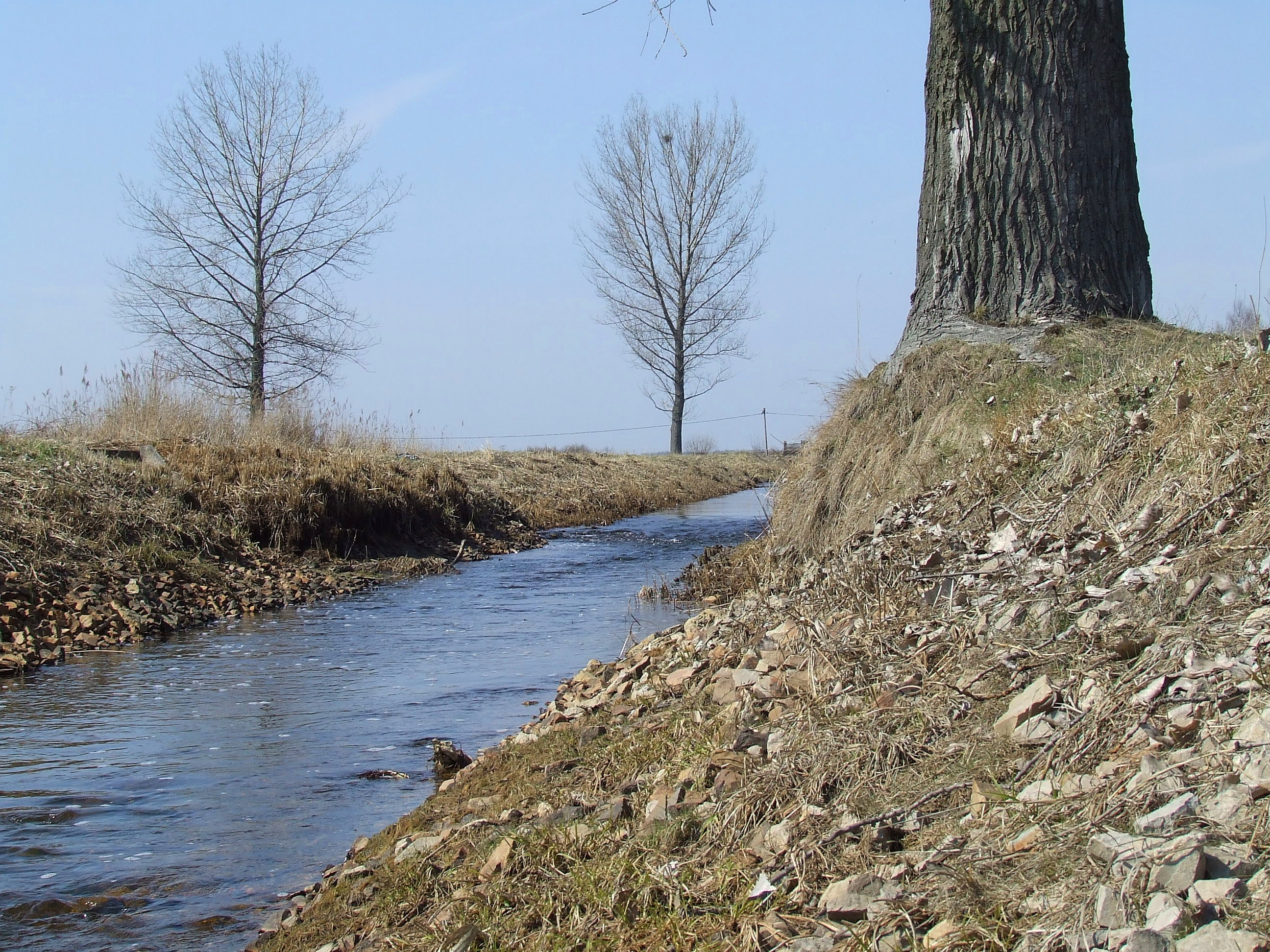 Rzeka Oleśnica w miejscowości Lipowe Pole Skarbowe